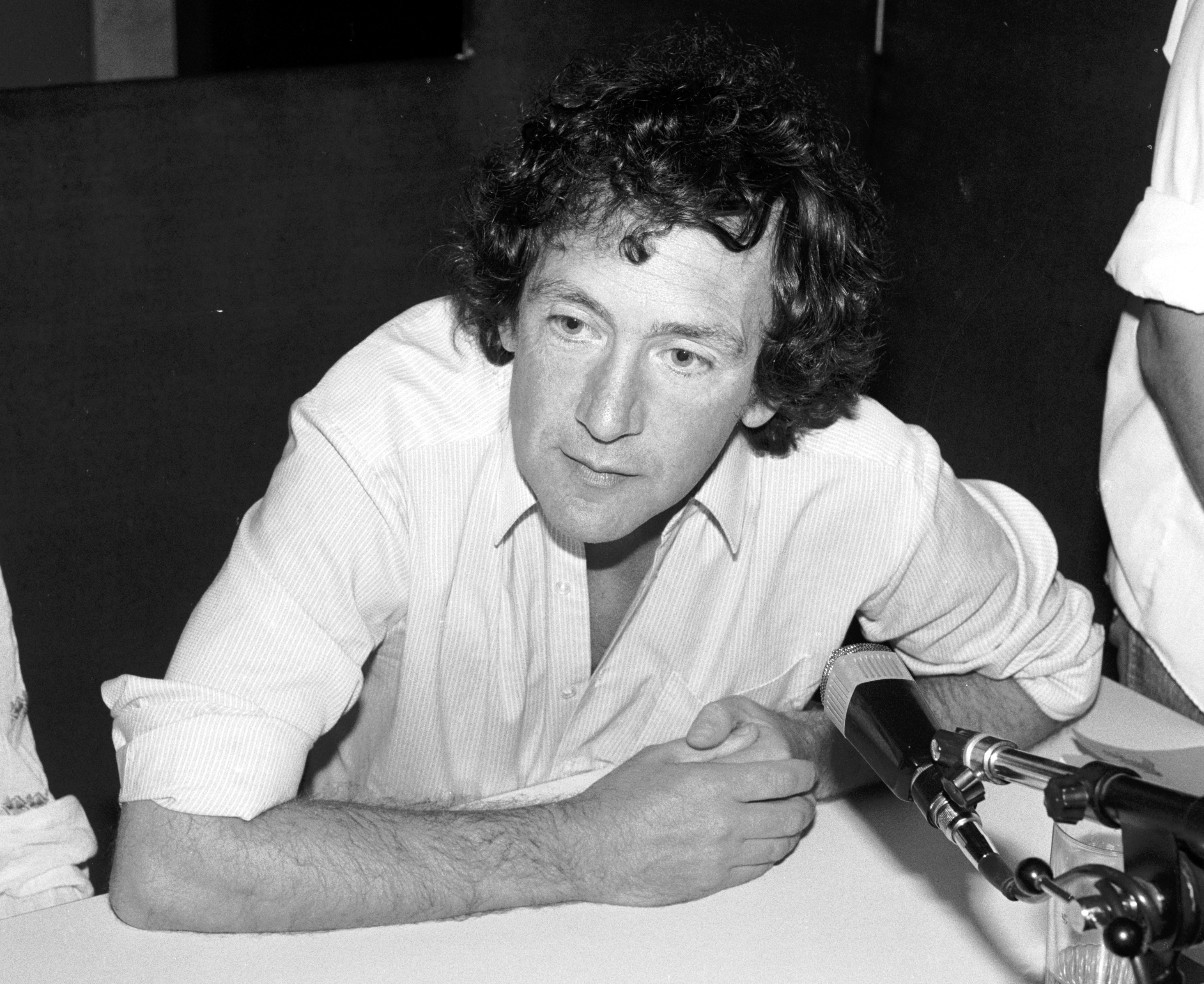 Le poète écossais Kenneth White à Morlaix (Finistère, France) en septembre 1981.